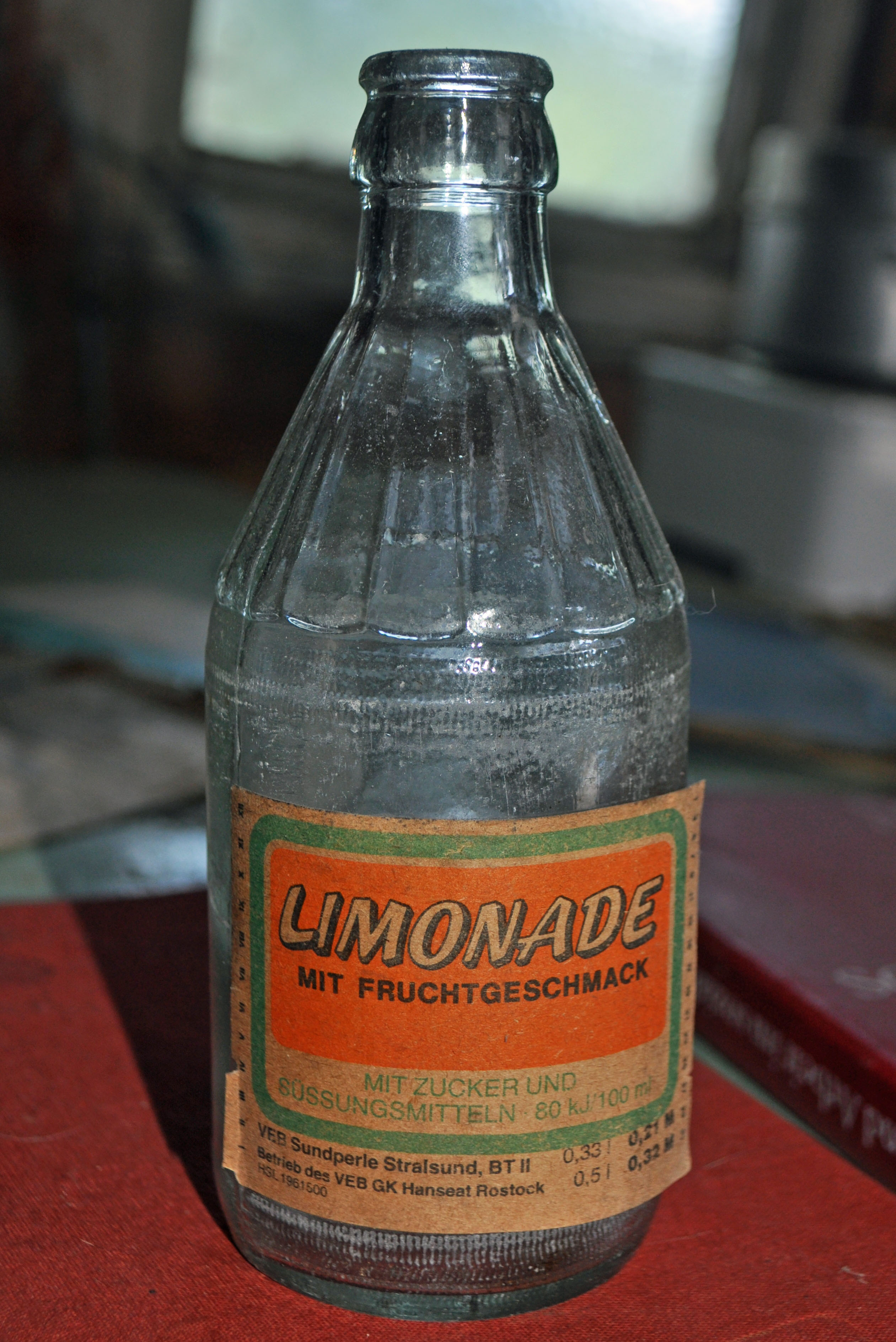 Auf dem Gelände des Nautineums auf dem Dänholm in Stralsund. Beschreibung siehe Dateiname.